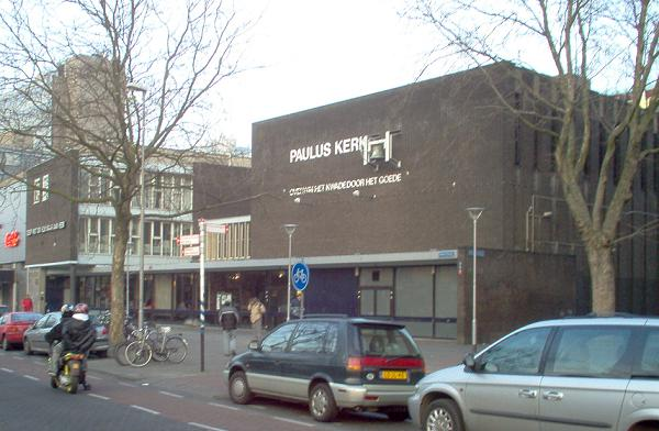 Ook langs de beroemde Pauluskerk gelopen van dominee Visser in Rotterdam, vanmiddag.